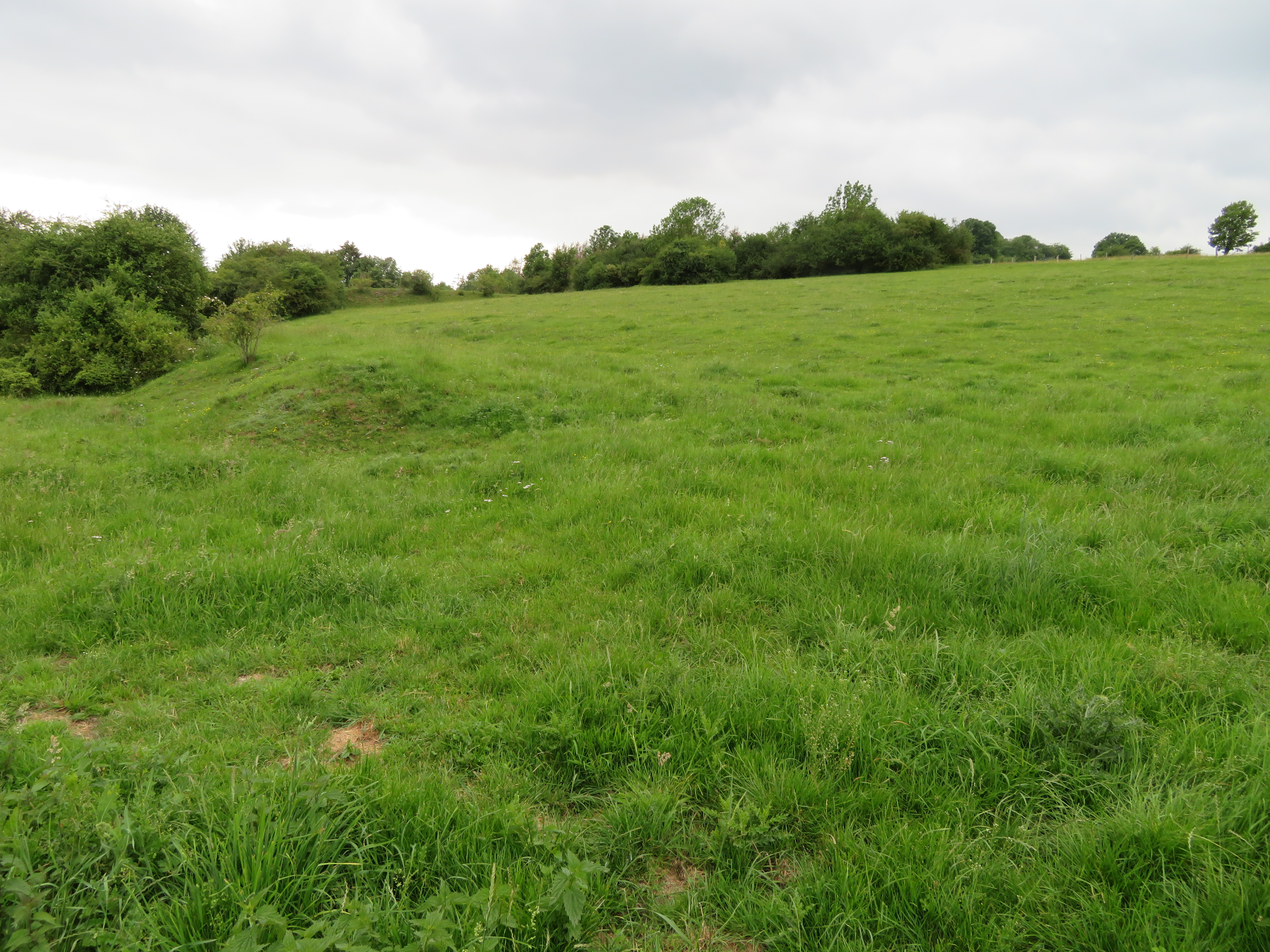 Naturschutzgebiet Flotsberg​ von Straße Fünf Brücken aus nach Norden aufgenommen.